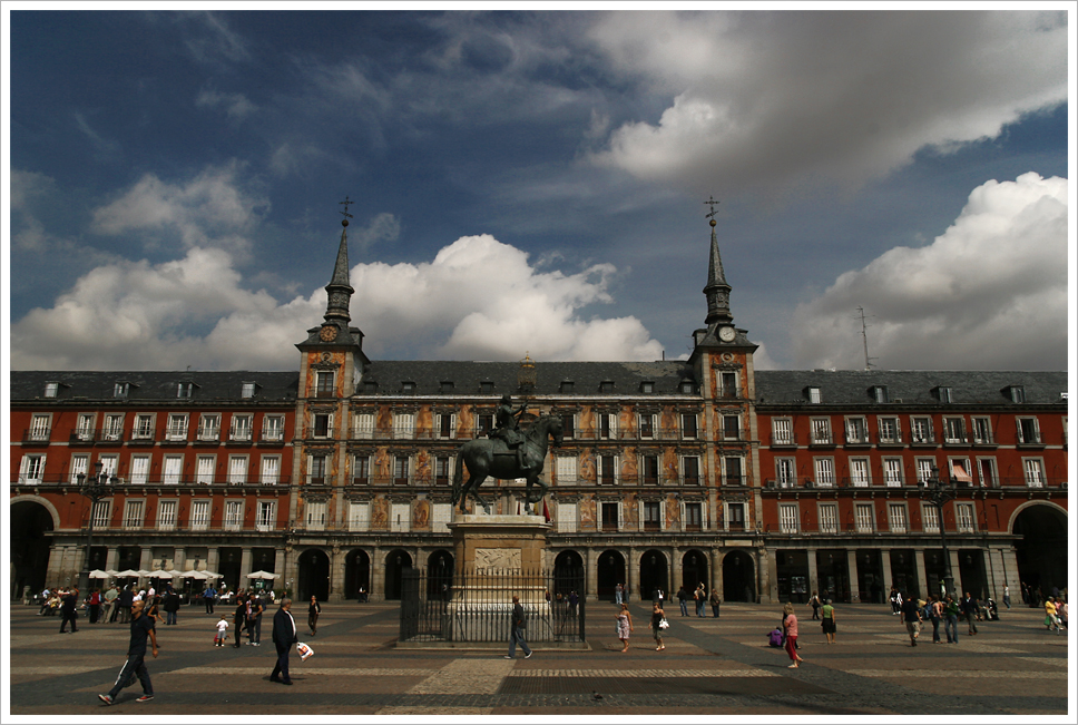 Vista de la Casa de la Panadería en la Plaza Mayor de Madrid.